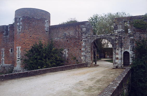 Portail d'entrée du château du Hallier, commune de Nibelle, Loiret, France